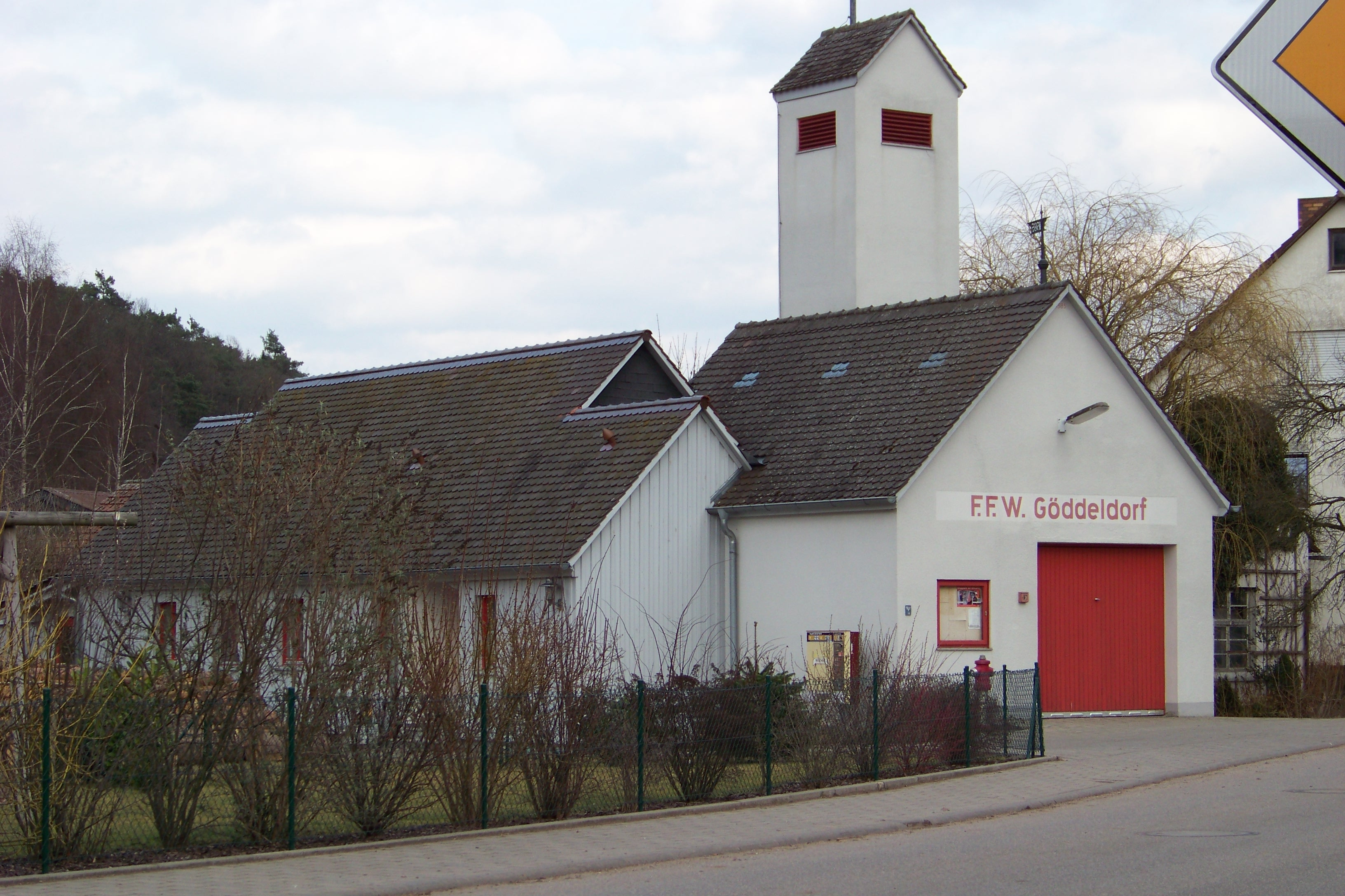 Feuerwehrhaus in Göddeldorf